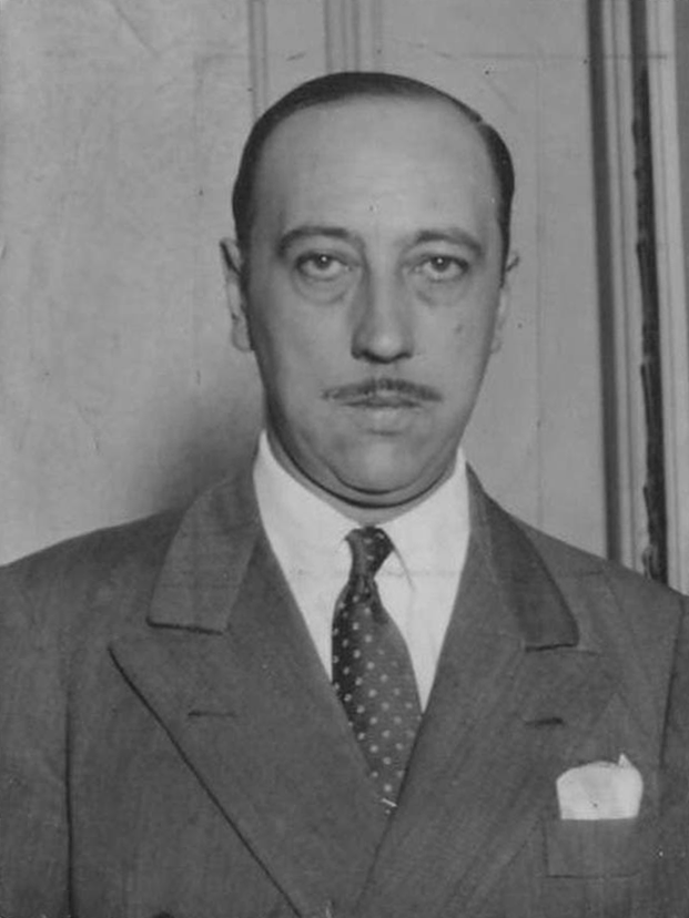 Ernesto Palacio, escritor argentino